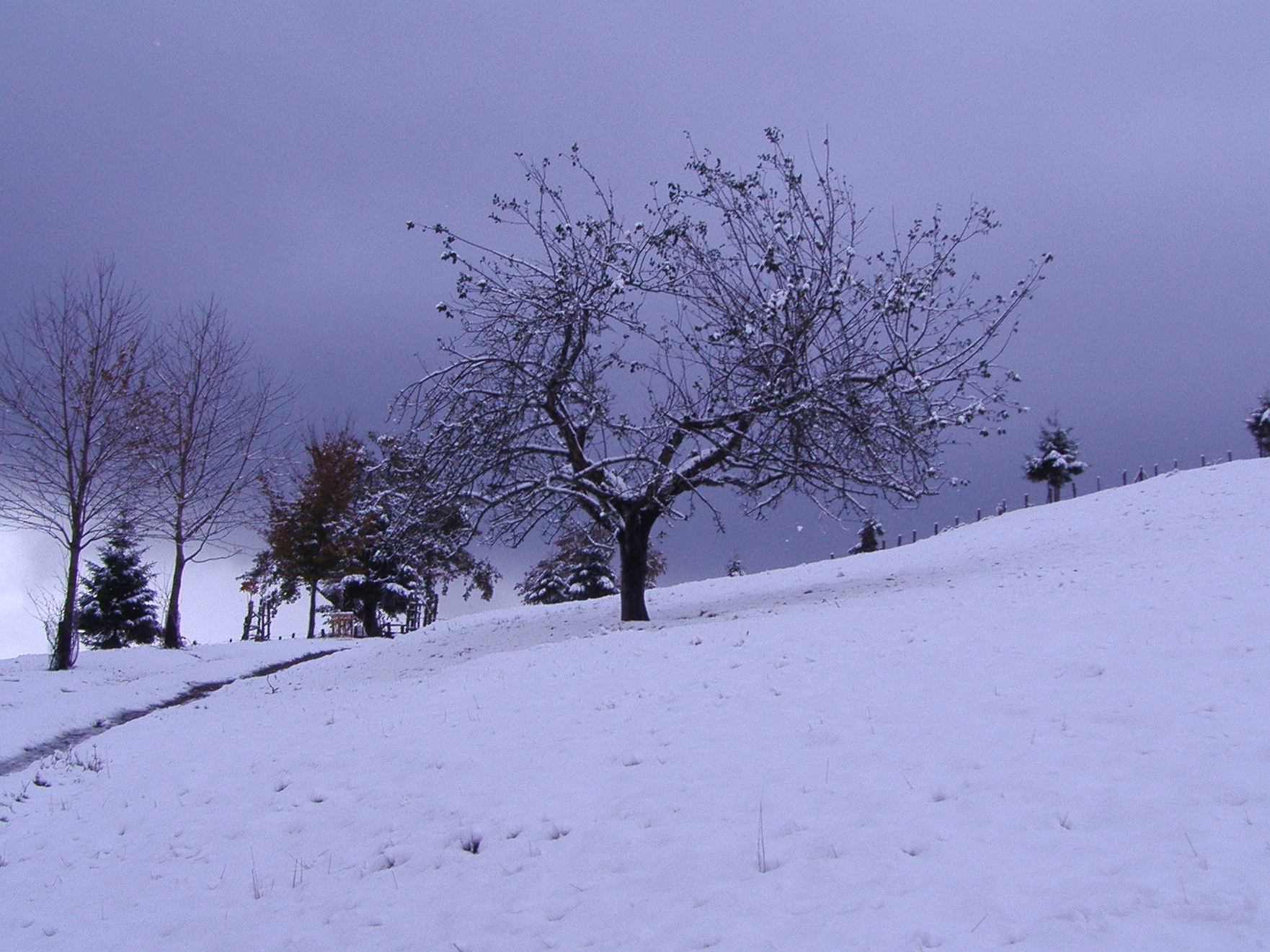 Viejo manzano en la Txokoborda de Bagordi. Baztán (Navarra)